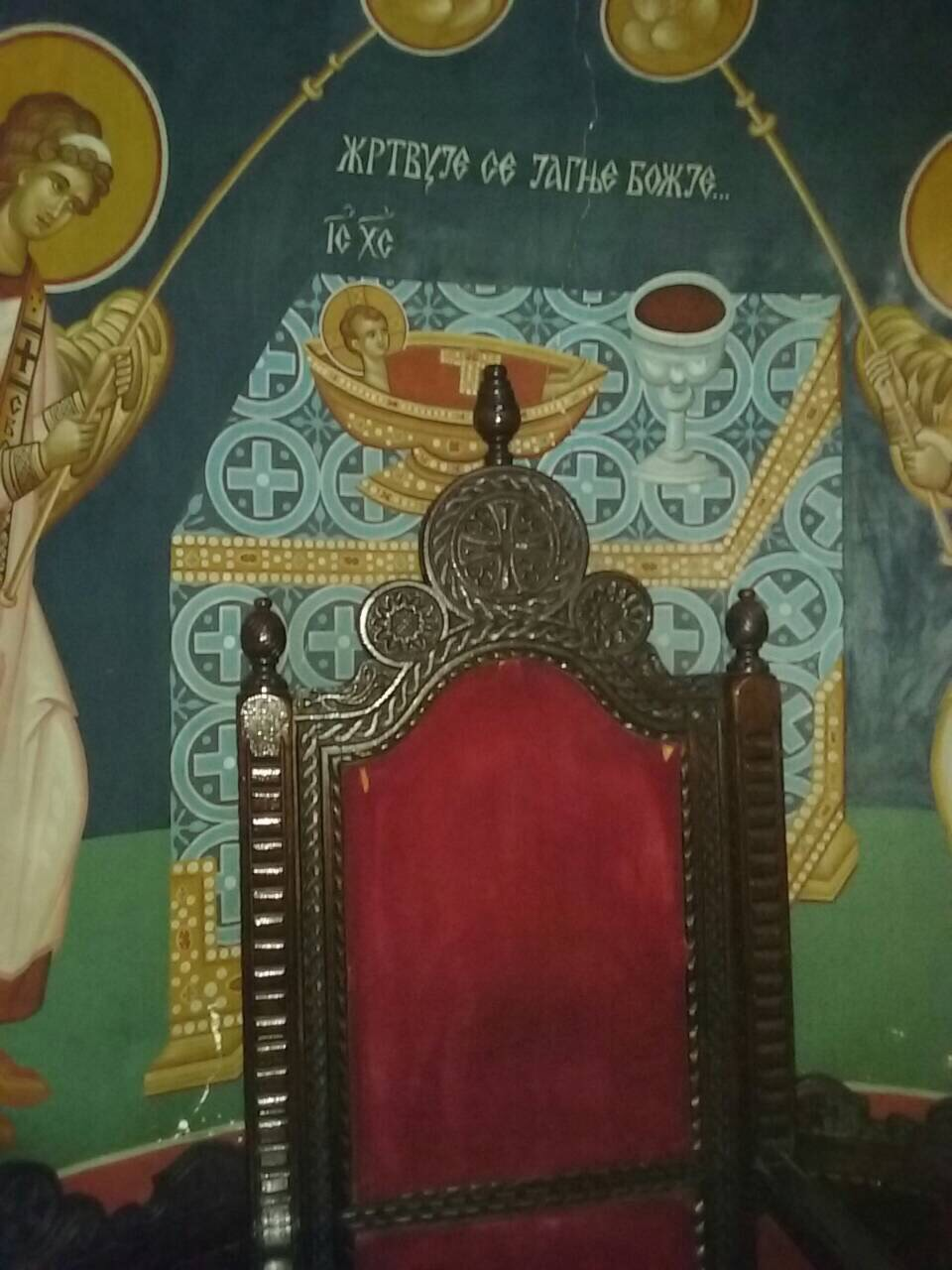 Hetimasija,detalj iz Saborne crkve u Kragujevcu